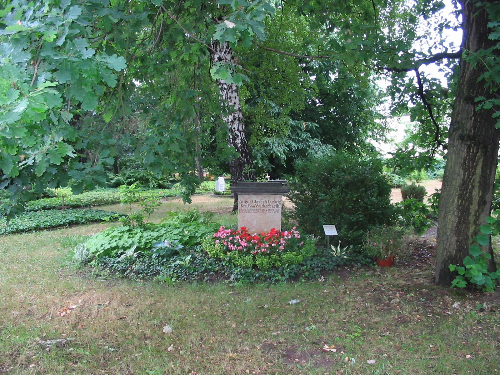 Radebeul, Alter Friedhof (Kötzschenbroda), Grabstein von August Josef Ludwig von Wackerbarth